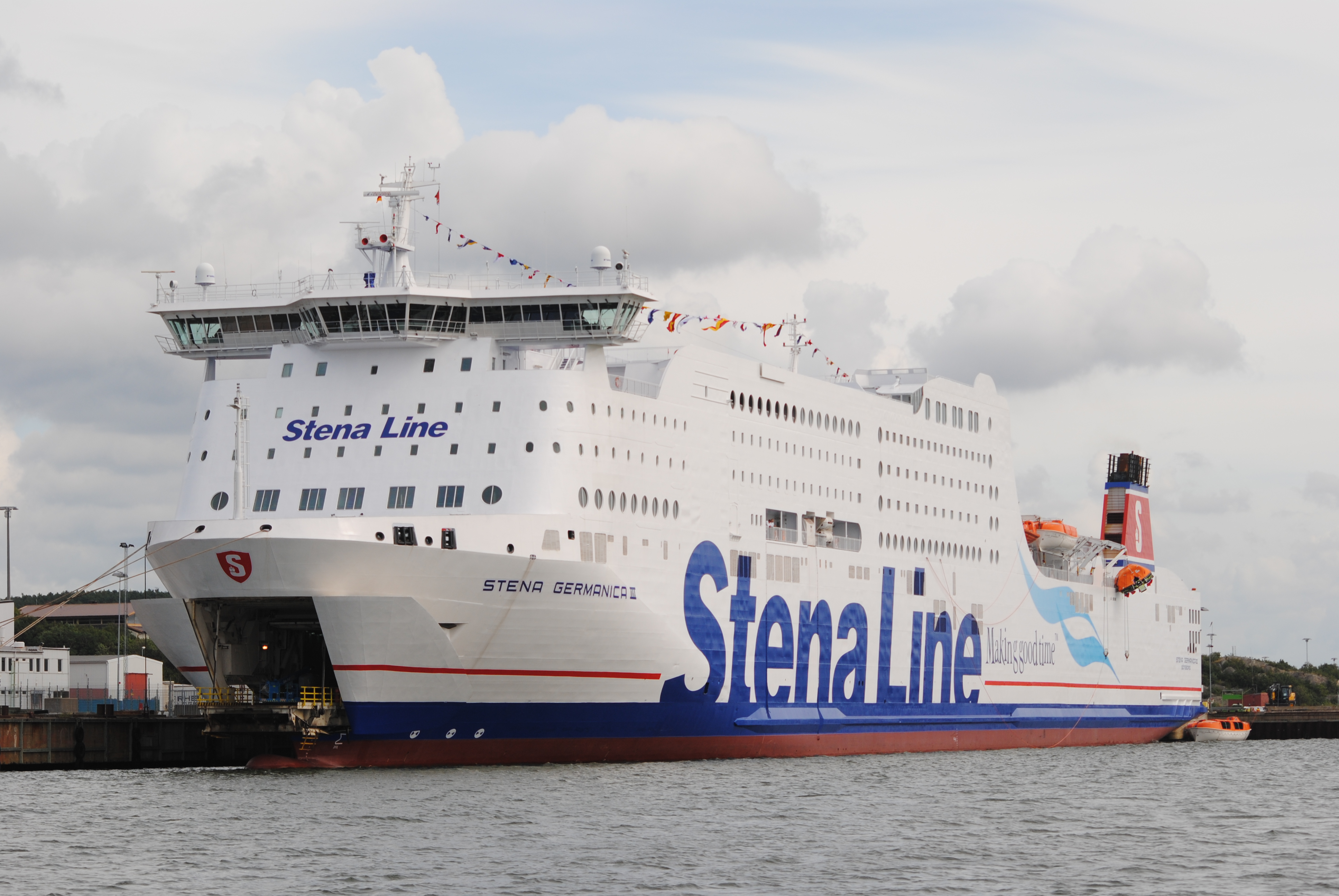 Stenas nya Stena Germanica 3 vid Arendal i Göteborg.I väntan på att köras i trafik på linjen Göteborg - Kiel Den 2010-08-31 är den första turen till Kiel.